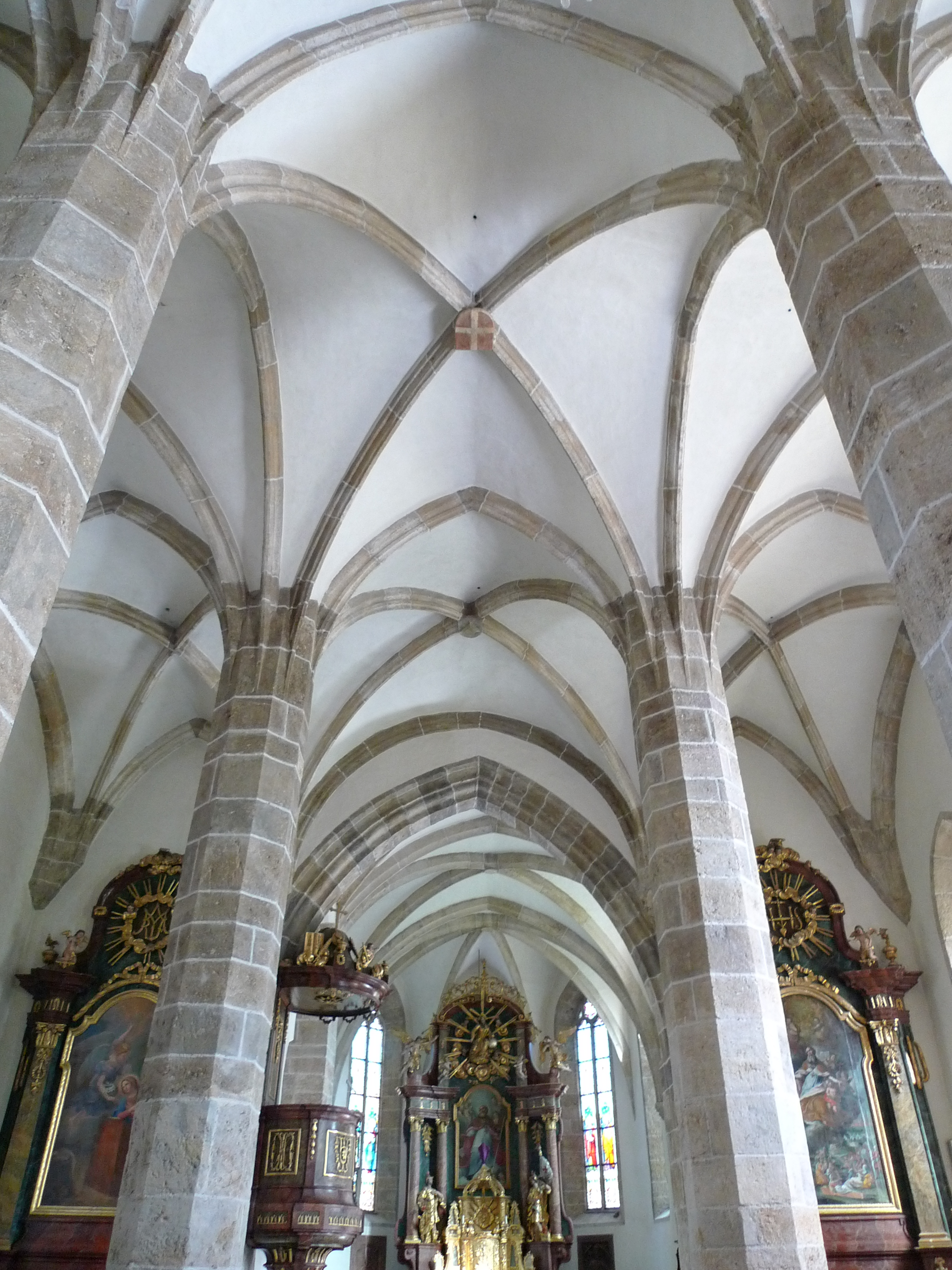 Kath. Pfarrkirche hl. Rupert mit Kirchhof, Ummauerung, Freitreppe und Verbindungsgang zum Pfarrhof